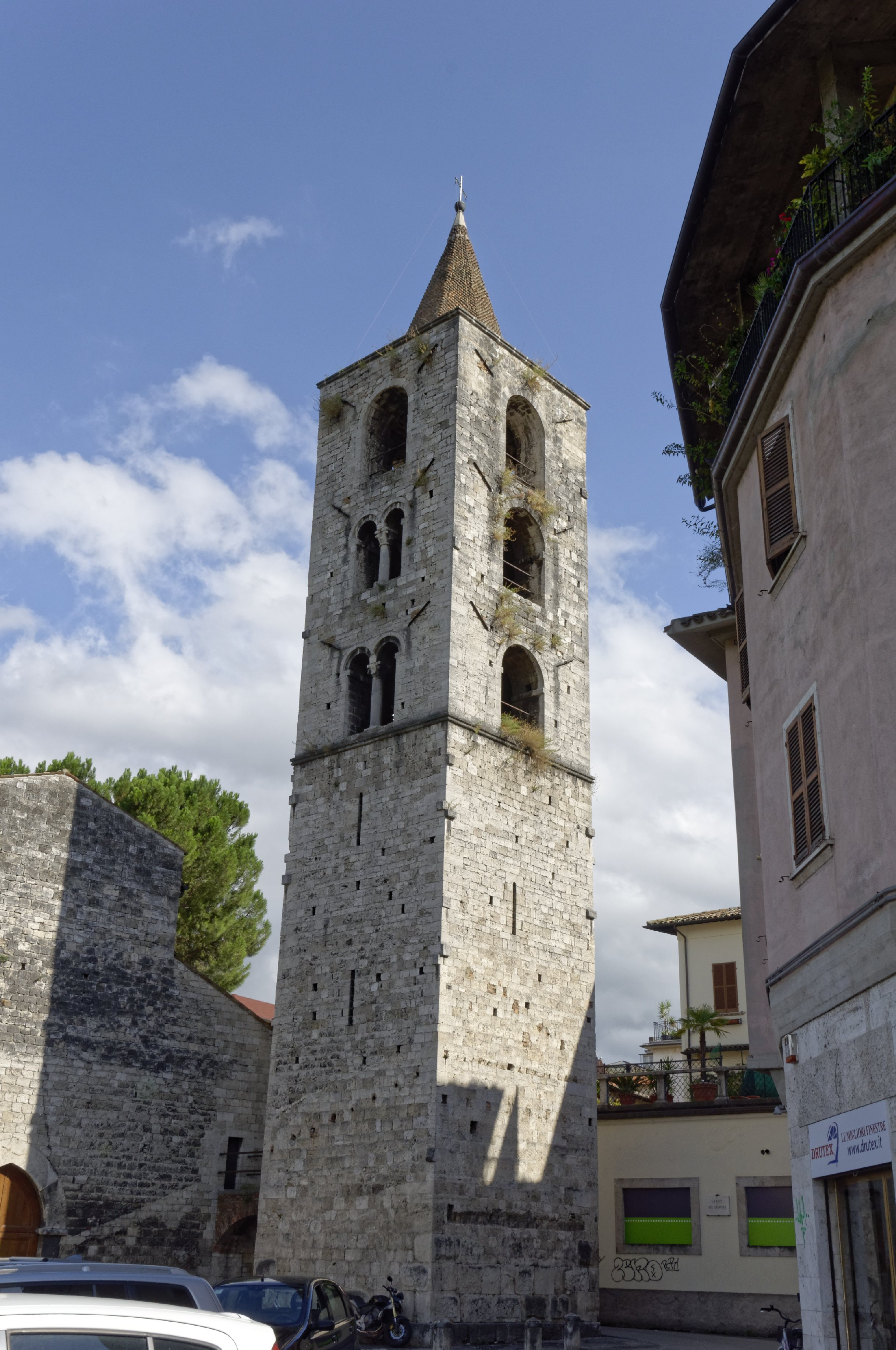 Ascoli Piceno 2015 Dieses Foto entstand in Zusammenarbeit mit Stadtbesichtigungen.de Die Seiten Stadtbesichtigungen.de, der dazugehörige Reise Blog sowie die Facebookseite: Stadtbesichtigungen Rom dürfen dieses Bild für Ihre Veröffentlichungen ohne den Hinweis auf Wikipedia, Commons bzw der Lizenz verwenden. Die Verantwortlichen habe von mir (Ra Boe) die Originaldaten zur freien Verfügung übermittelt bekommen.